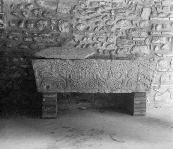 Sepulcre al claustre de la catedral d'Elna. Marcel·lí Gausachs i Gausachs (Entre 1920 i 1930)